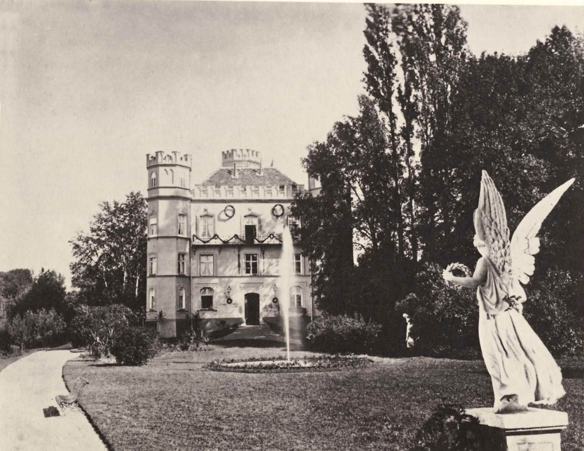 Joseph Albert: Bayerische Königsschlösser, Schloss Berg am Starnberger See, um 1886